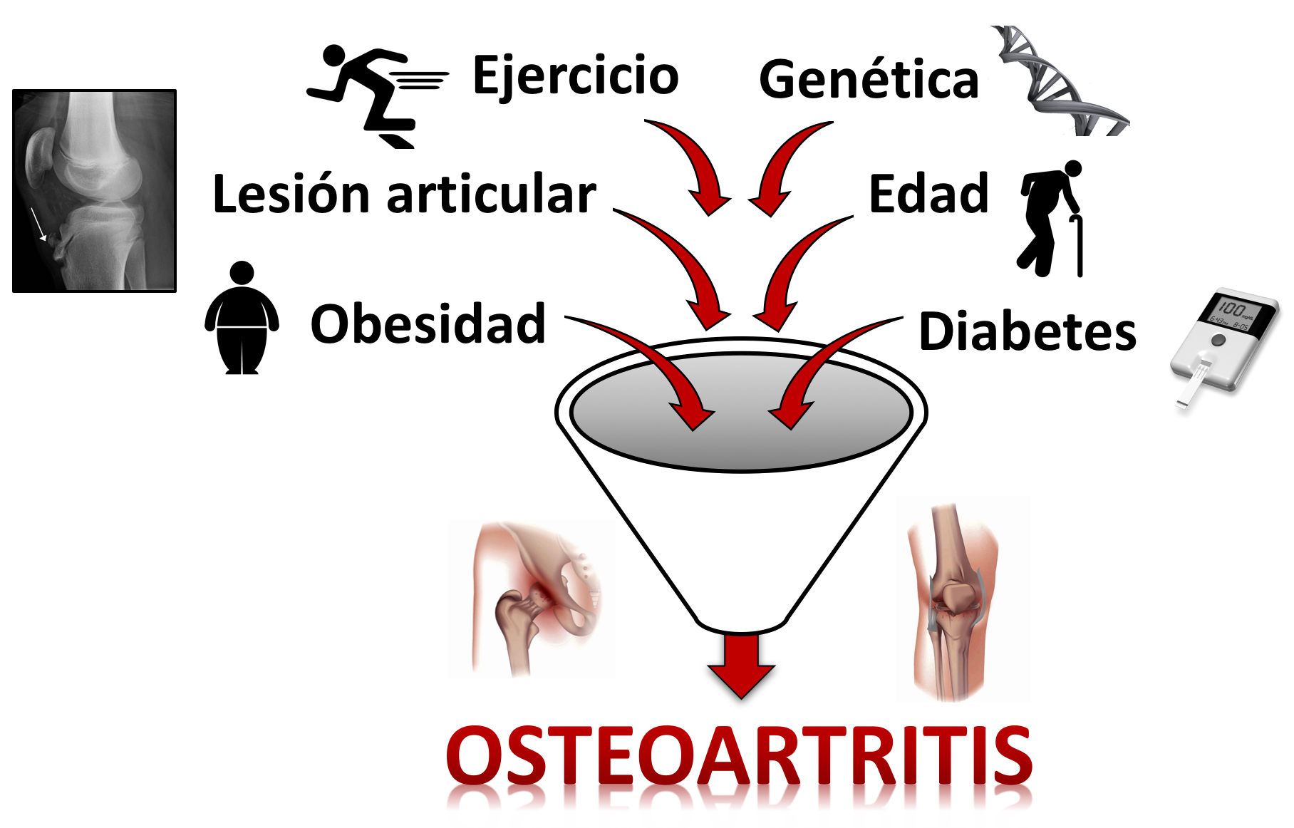 Esquema resumen de los factores etiológicos que influyen en el desarrollo de la osteoartritis.